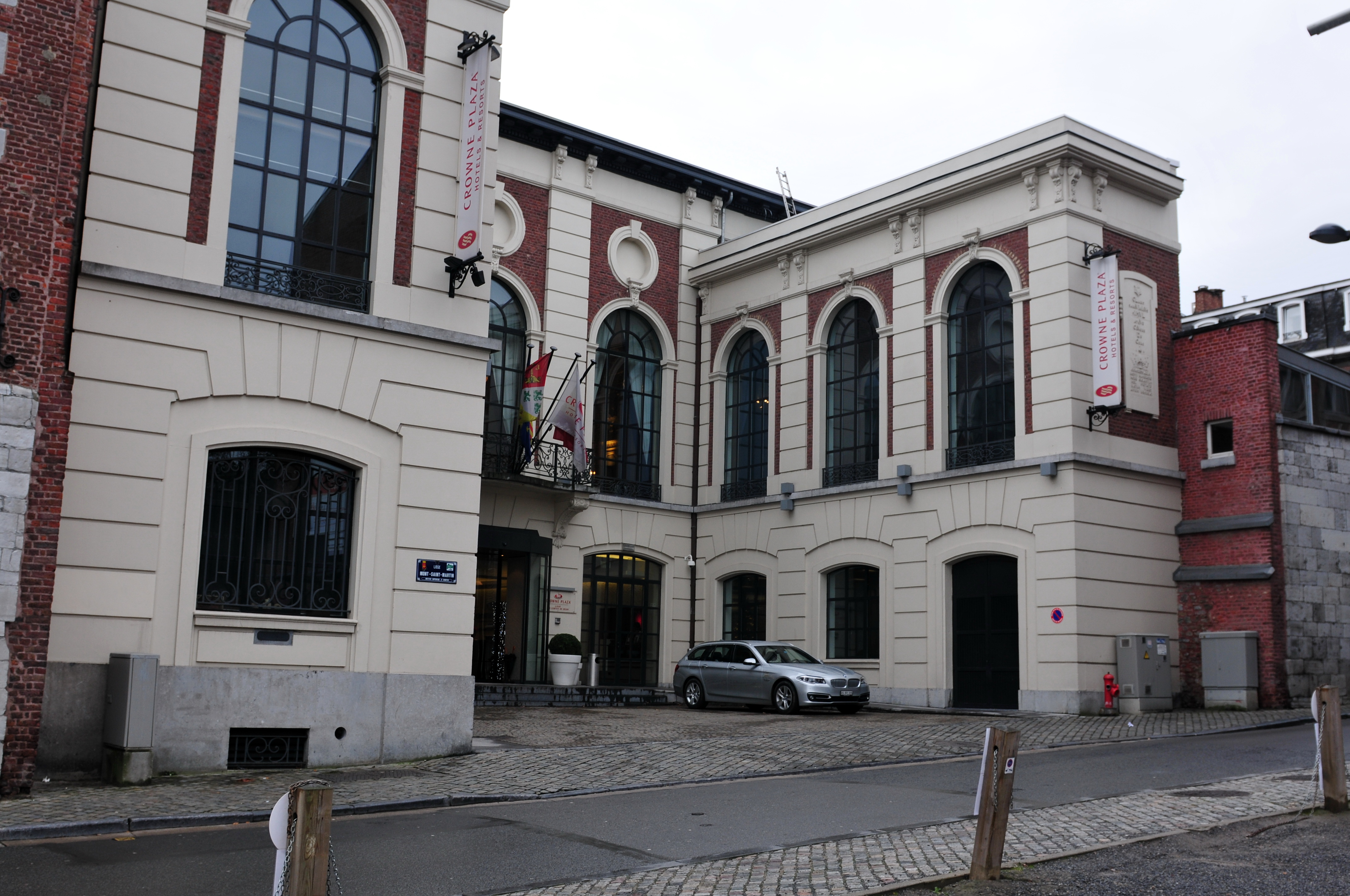 Lüttich